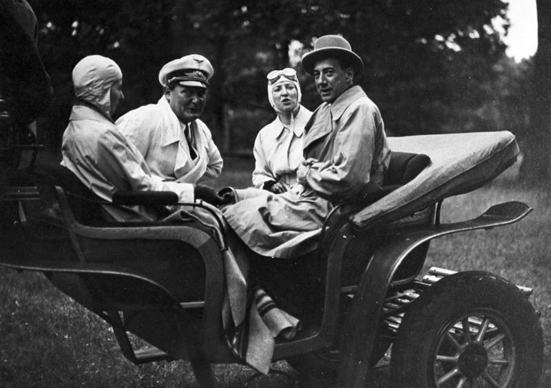 Juli 1935 Ausfahrt mit dem polnischen Aussenminister [Josef] Beck